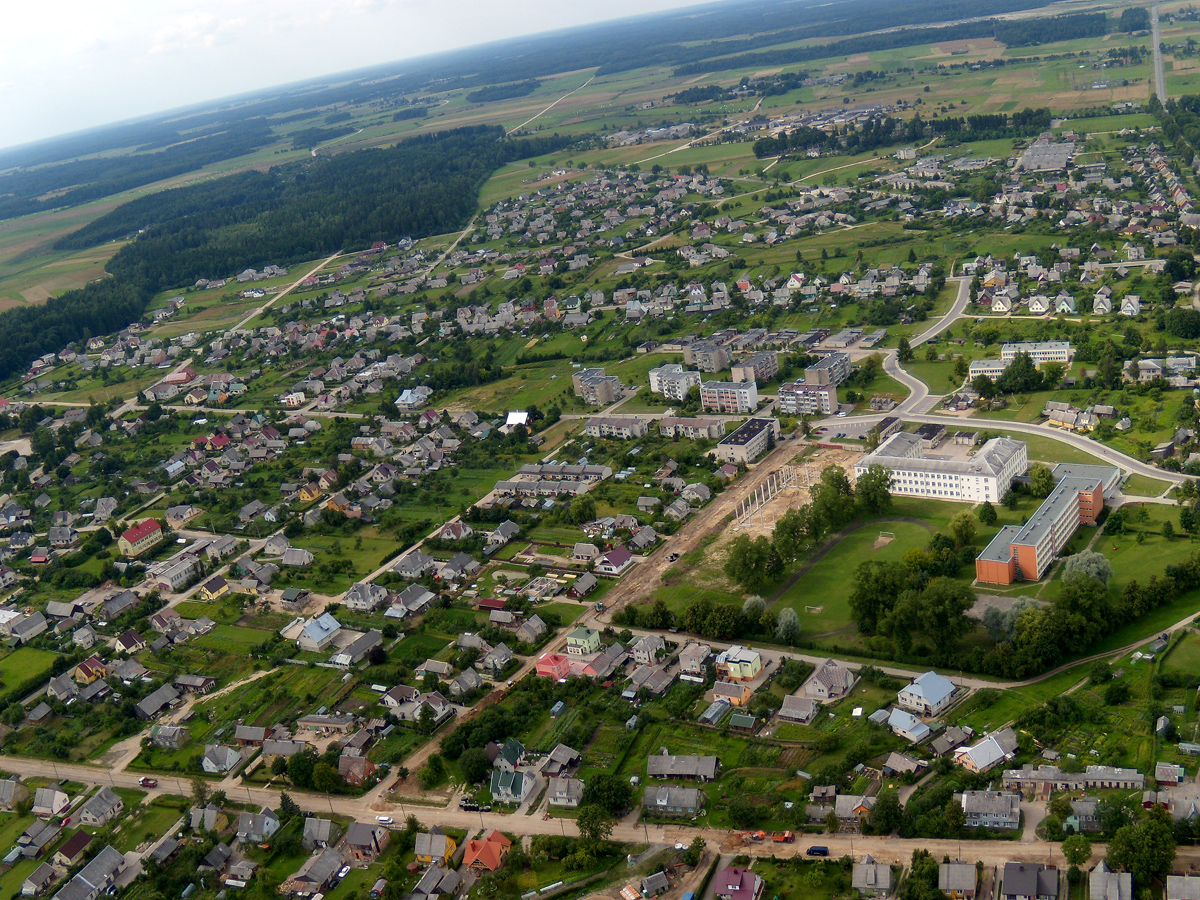 Rietavas-vakarų dalis